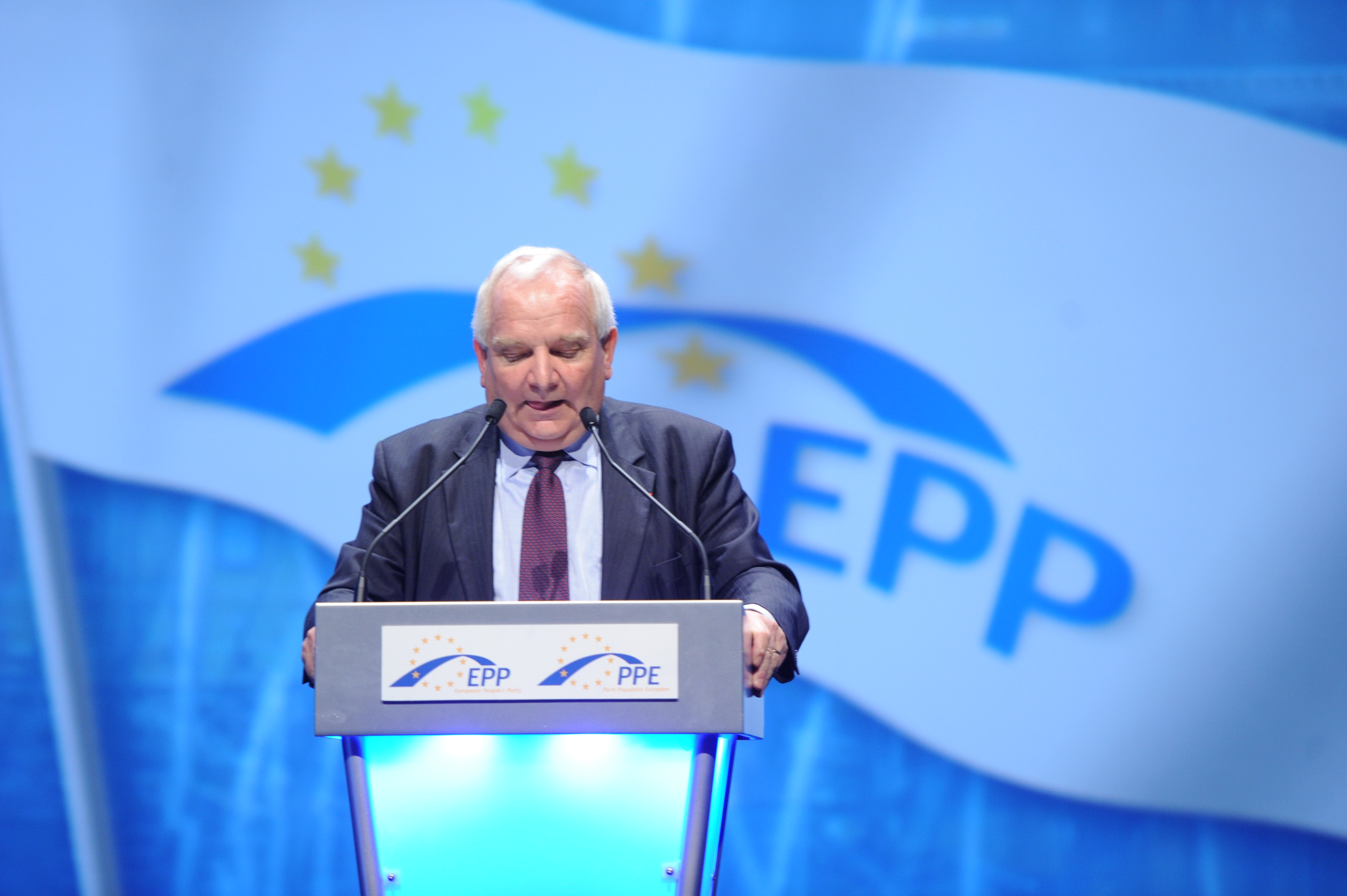 EPP Congress Marseille 6024